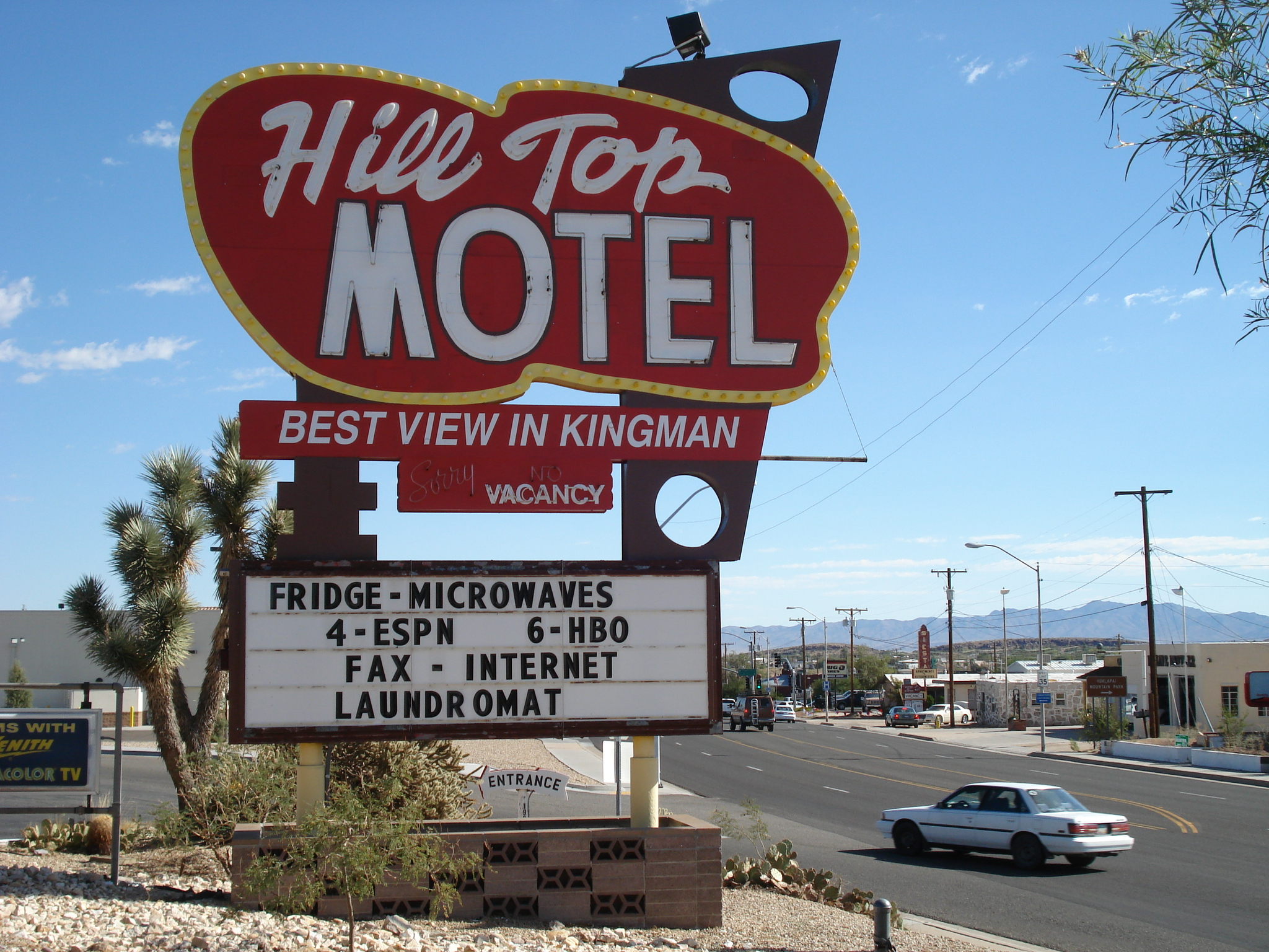 Enseigne du motel Hill Top à Kingman le long de la route 66